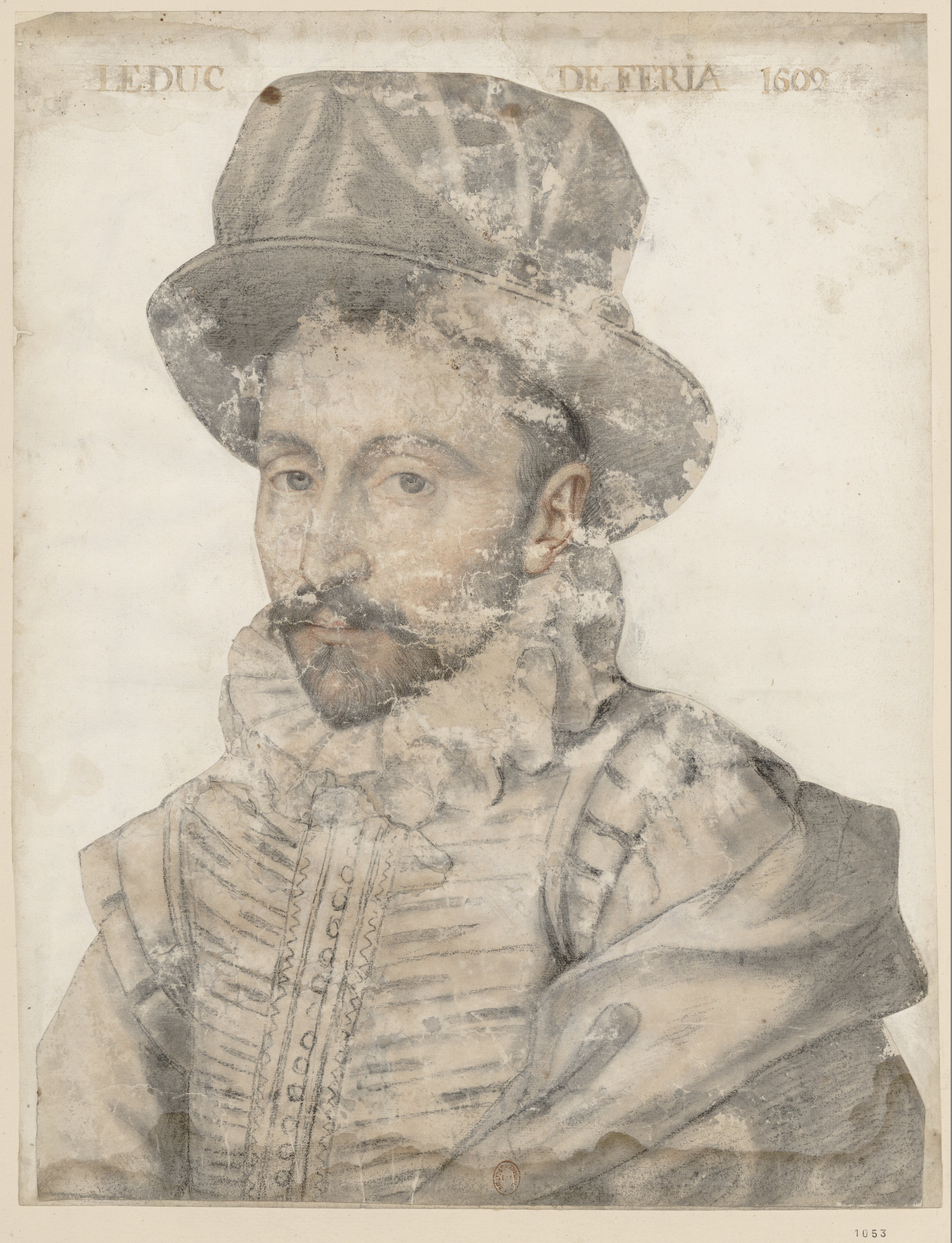 Le duc de Feria